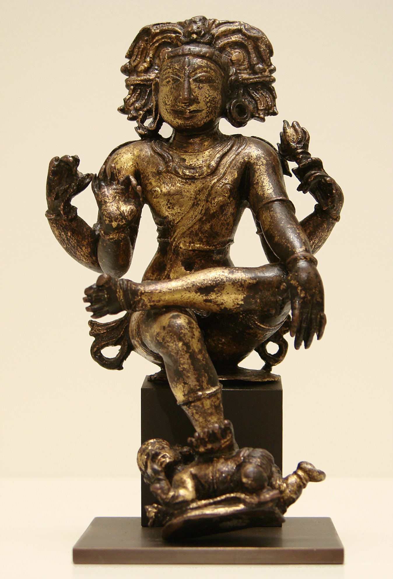 Shiva Vyakhyana Dakshinamurti : Siva Maître de la Connaissance assis en attitude héroïque. Dynastie Vijayanagar (15e-16e siècle), Inde du Sud, XVIe siècle. Bronze doré, H. 11 L. 6 cm. Musée Guimet, Paris.